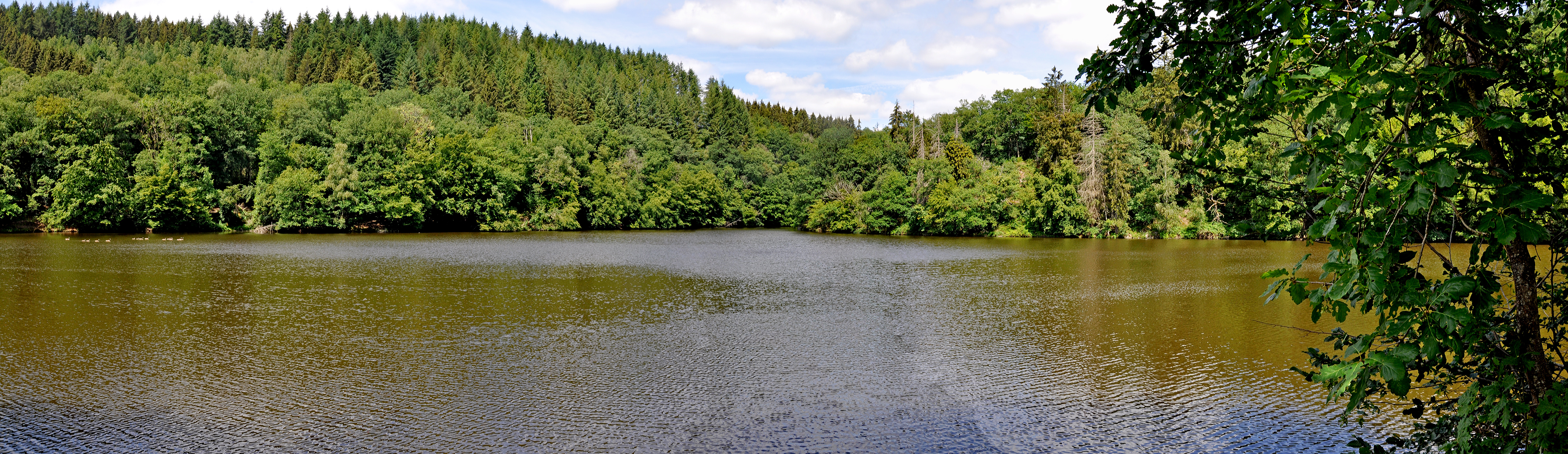 Natuurpark van de twee Ourthes